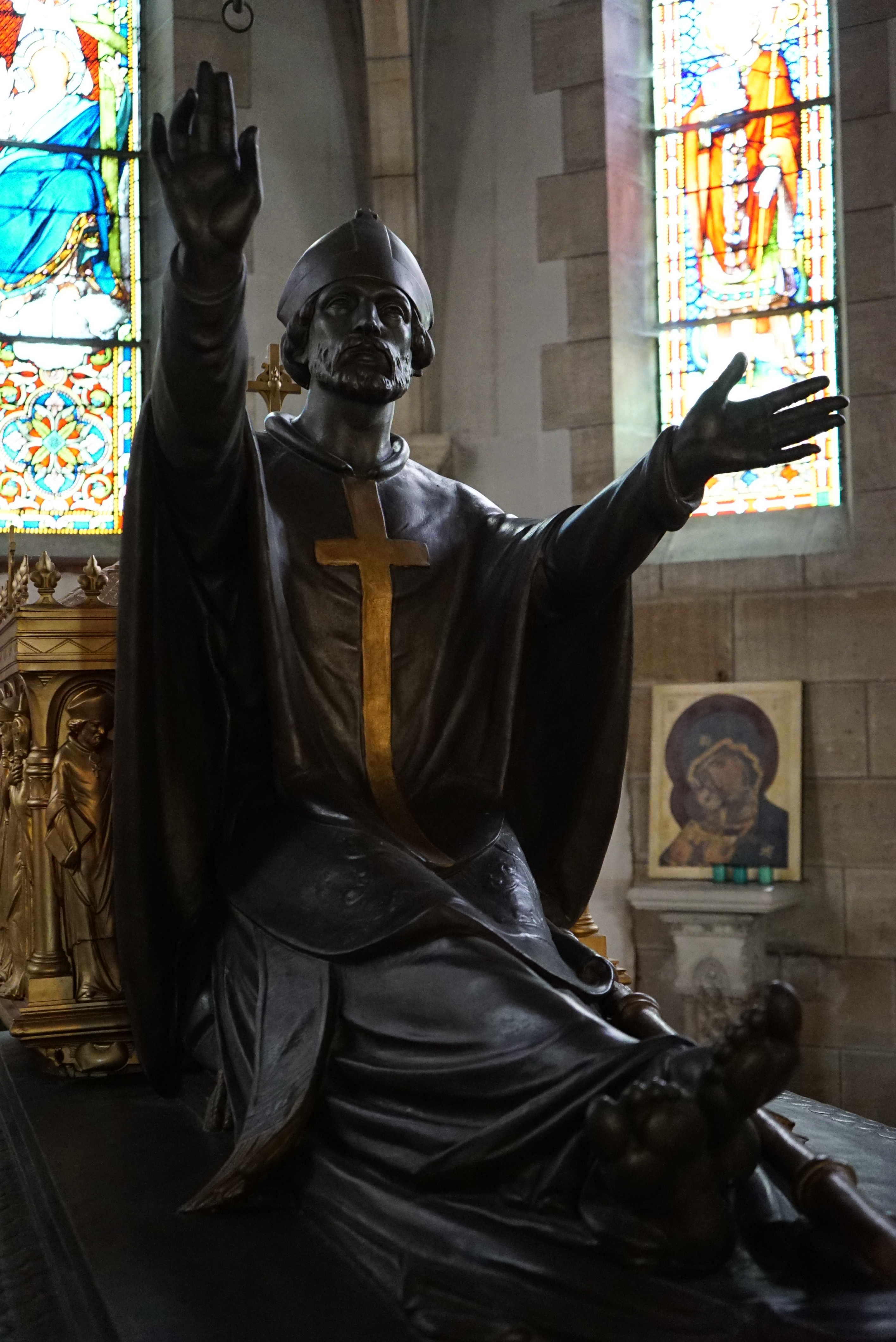 intérieur de l'Église Saint-Memmie de Saint-Memmie.